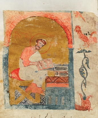 მინიატიურა ბიჭვინთის ოთხთავიდან